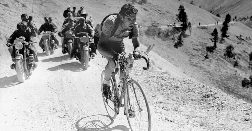 Txirrindulari bat 1936. urteko Tourrean